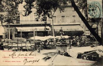 France, Aude (11), Limoux, place de la république